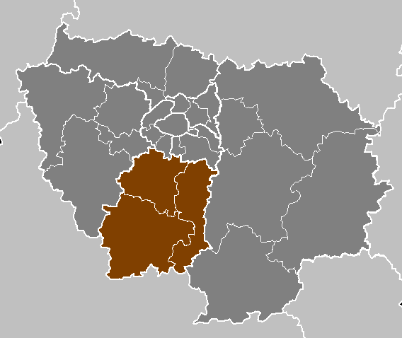 Maps of arrondissements and cantons of France: Département de l Essonne.PNG (Région Île-de-France)